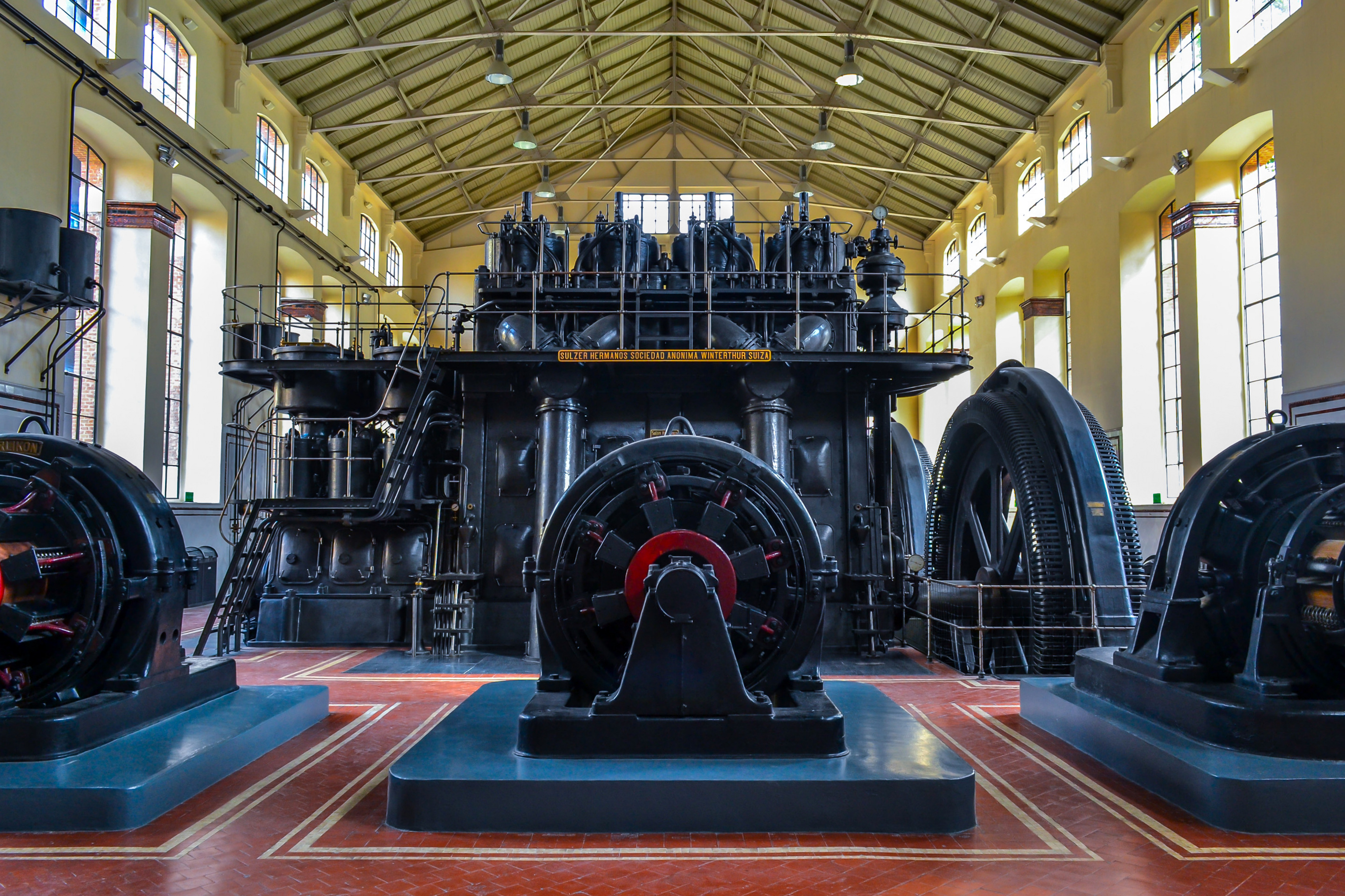 Imagen del interior de la Nave de motores de Metro de Madrid, mostrando uno de los 3 motores diésel (centro) así como los 3 transformadores (primer plano)